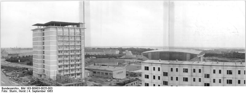 Schwerin, Wohnblock, Sport- und Kongresshalle Zentralbild Sturm St 4.9.1963 Schwerin, Mecklenburg In Schwerins Neustadt sind die Bauarbeiten abgeschlossen. Bis auf die restlichen Innenausbauten sowie eine Oberschule und ein Kindergarten, für die erst die Erschließugsarbeiten angefangen haben, ist die Neustadt fertig. Zum Tag der Volkswahlen soll die 2390. Wohnung 1958 übergeben werden, bis Jahresschluß sollen dann weitere 186 und der letzte Block im Jahr 1964. UBz: Links ein neuer Wohnblock mit ein- und eineinhalb-Zimmerwohnungen, im Hintergruhnd die neue Sport- und Kongresshalle, die mit einem kostenaufwand von 8,2 Millinen DM errichtet und 1962 ihrer Bestimmung übergeben wurde.